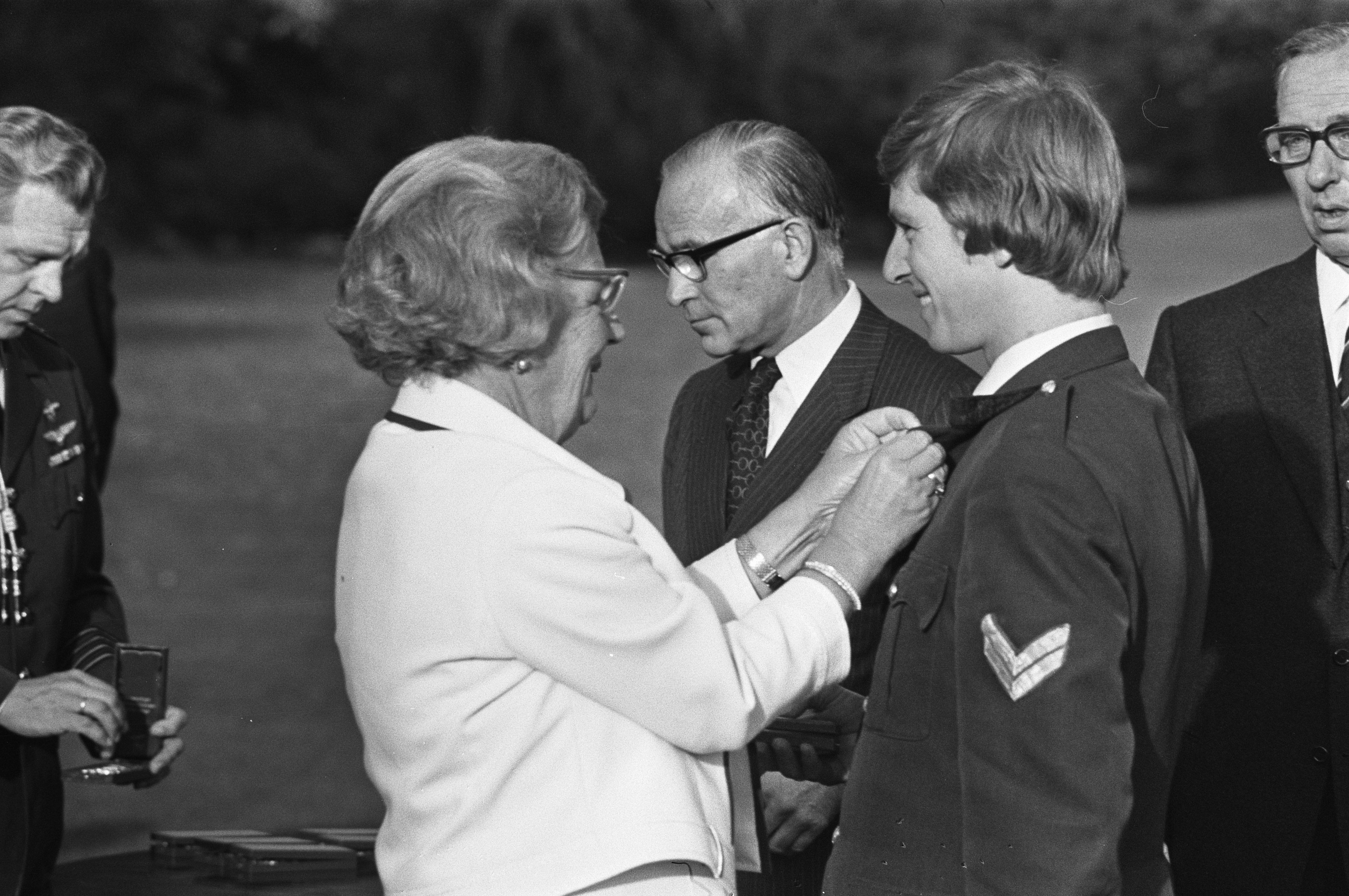 Koningin Juliana ontvangt allen die zich bij het gijzelingsdrama verdienstelijk hebben gemaakt op Huis ten Bosch ; de gewonde agent wordt door Hare Majesteit onderscheiden